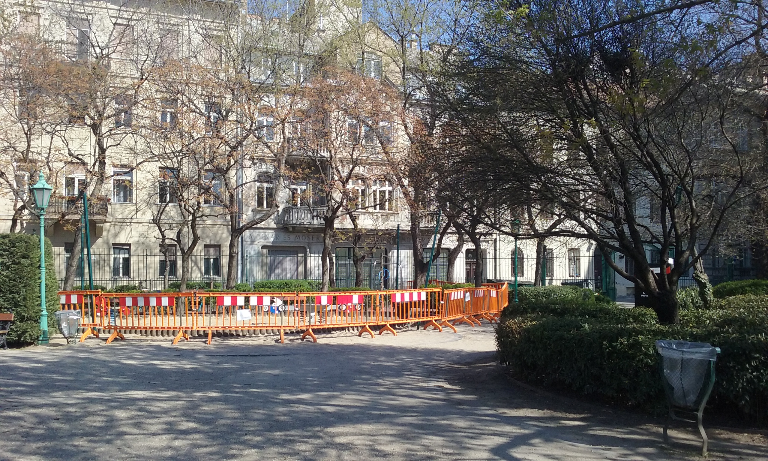 A koronavírus-járvány miatt lezárt játszótér a Károlyi-kertben, Budapest